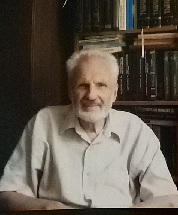 Георгий Георгиевич Сильницкий, российский учёный-лингвист, профессор Смоленского университета.